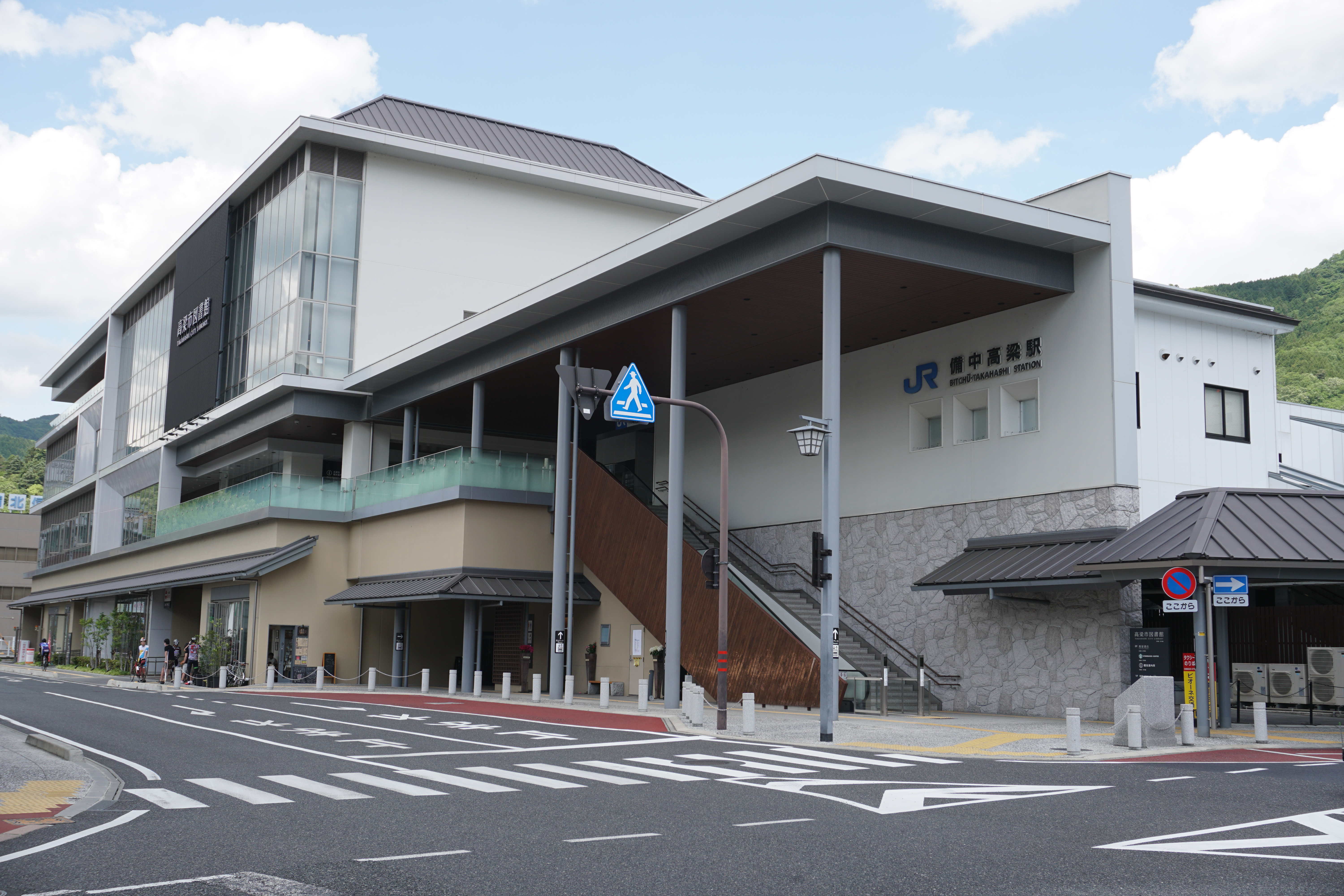 備中高梁駅駅舎（西口）を撮影。写真左は高梁市複合施設。